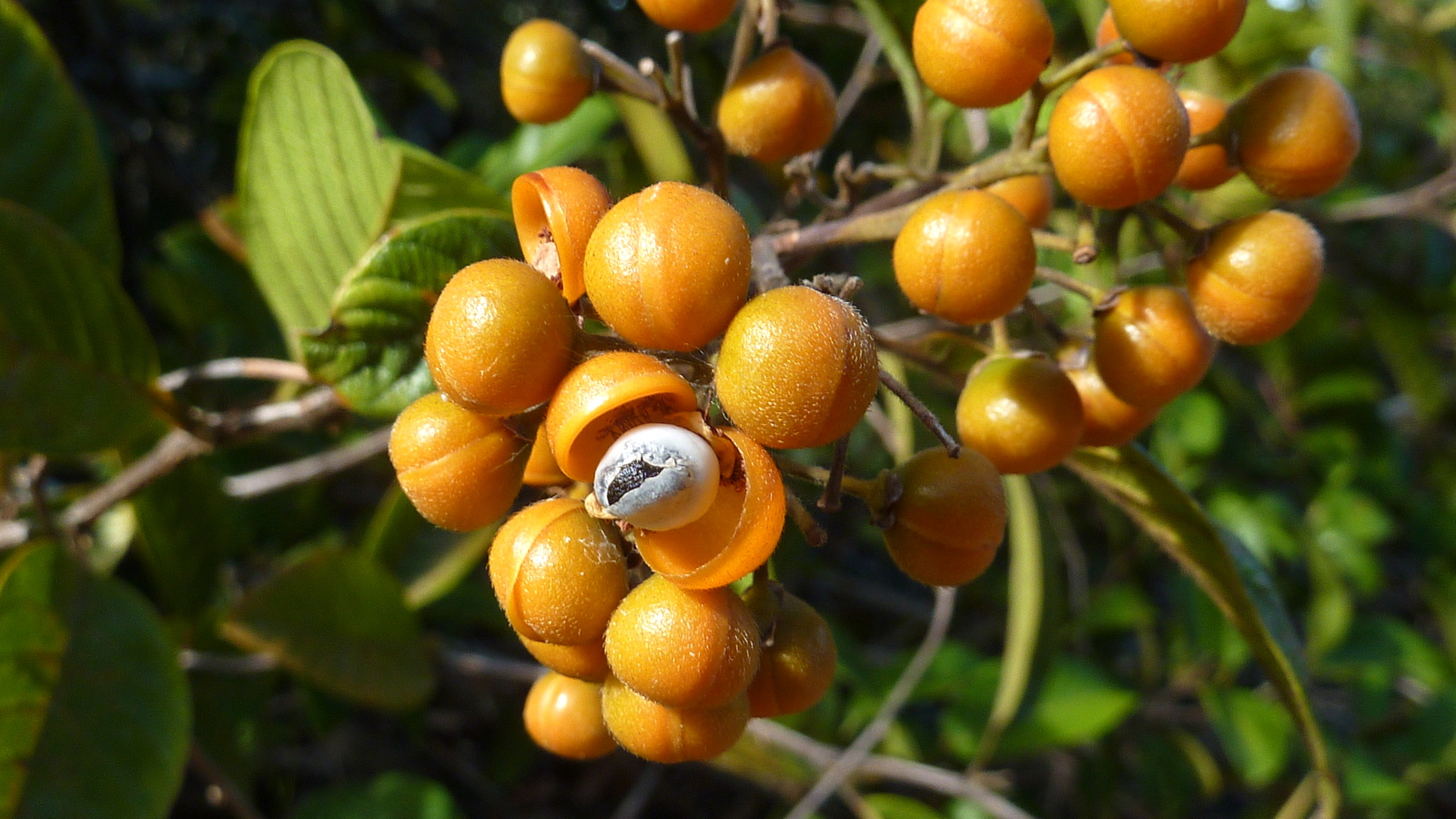 Davilla kunthii A. St.-Hil.